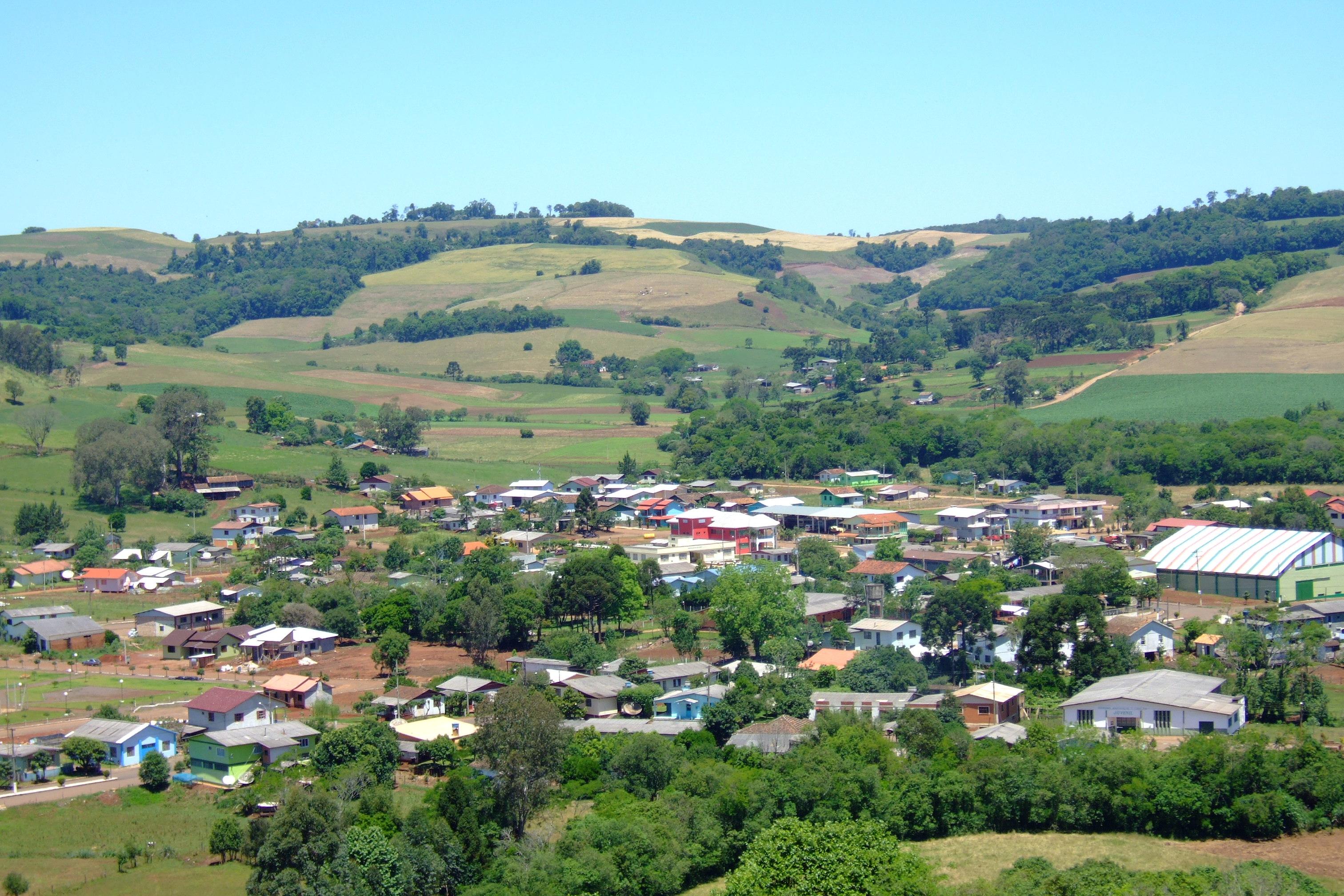 Município Ponte Preta